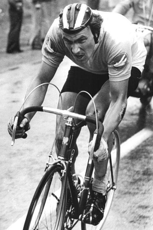 Aavo Pikkuus ADN-ZB Reiche 16.5.77 str Cottbus: 30.Internationale Friedensfahrt 8.Etappe. Bereits acht Etappen lang trägt der UdSSR-Fahrer Aa Pikkuus das Gelbe Trikot de Spitzenreiters.Auch auf der neunten Etappe von Cottbus nach Dresden wird er versuchen, seinen Vorsprung zu Verteidigen.